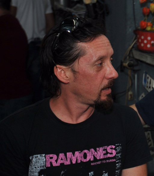 Dario Vitez